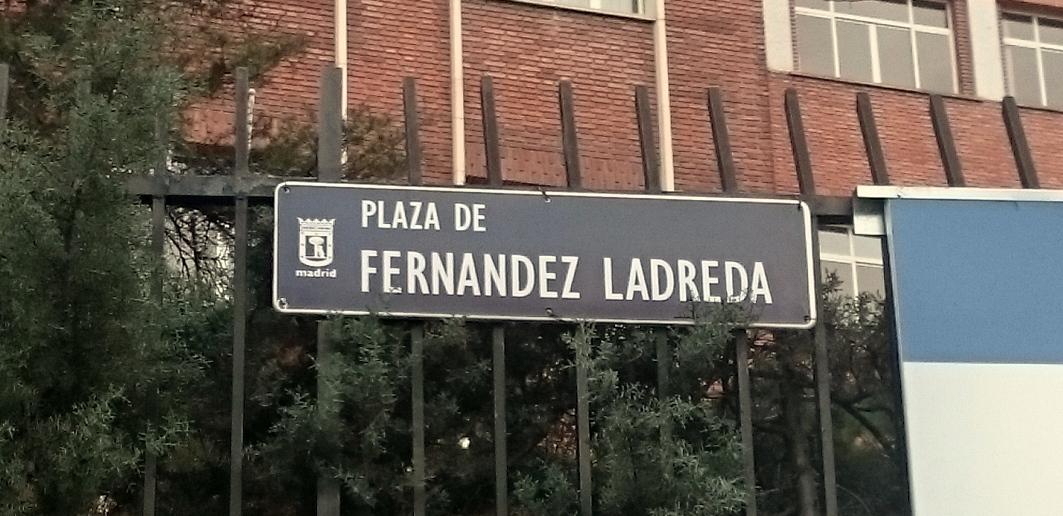 Placa de la plaza de Fernández Ladreda en la valla del colegio San Viator